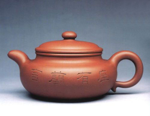 中文（中国大陆）: 座有兰言壶